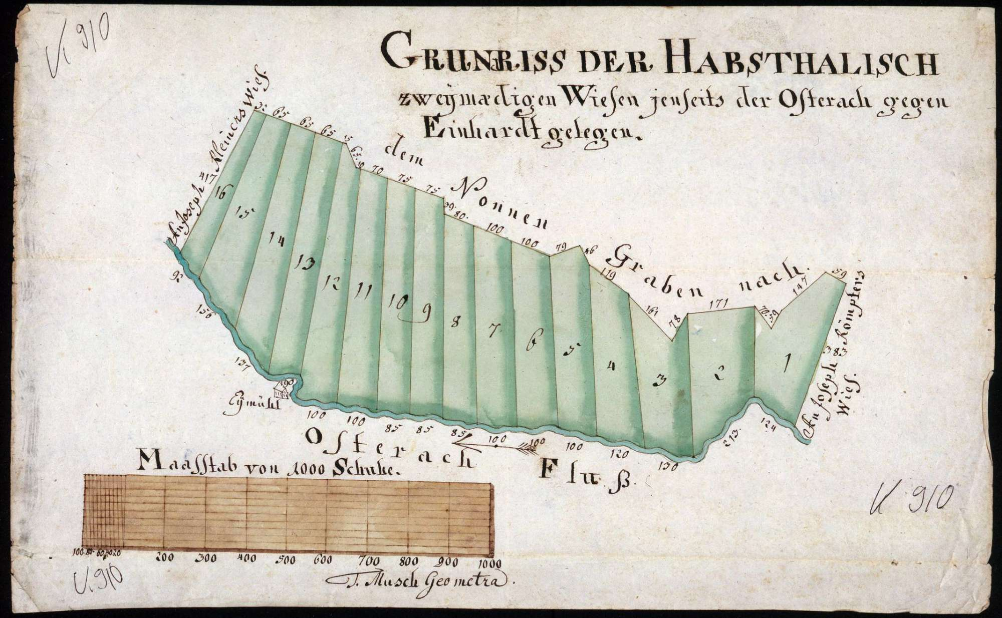 Deutschland (D) - Baden-Württemberg (BW) - Landkreis Sigmaringen (SIG) - Ostrach: Karte der zweimadigen (mit zweimaligem Schnitt) jenseits der Ostrach und gegen Einhart gelegenen Habsthalischen Wiese Quelle/Sammlung: Landesarchiv Baden-Württemberg, Abt.Fürstlich Hohenzollernsches Haus- und Domänenarchiv (Dep. 39) Archivaliensignatur: Alt-/Vorsignatur: Maße: 22 x 35,5 cm (Höhe x Breite) Bemerkungen: Digitalisat im Angebot des Archivs: Online-Findbuch im Angebot des Archivs